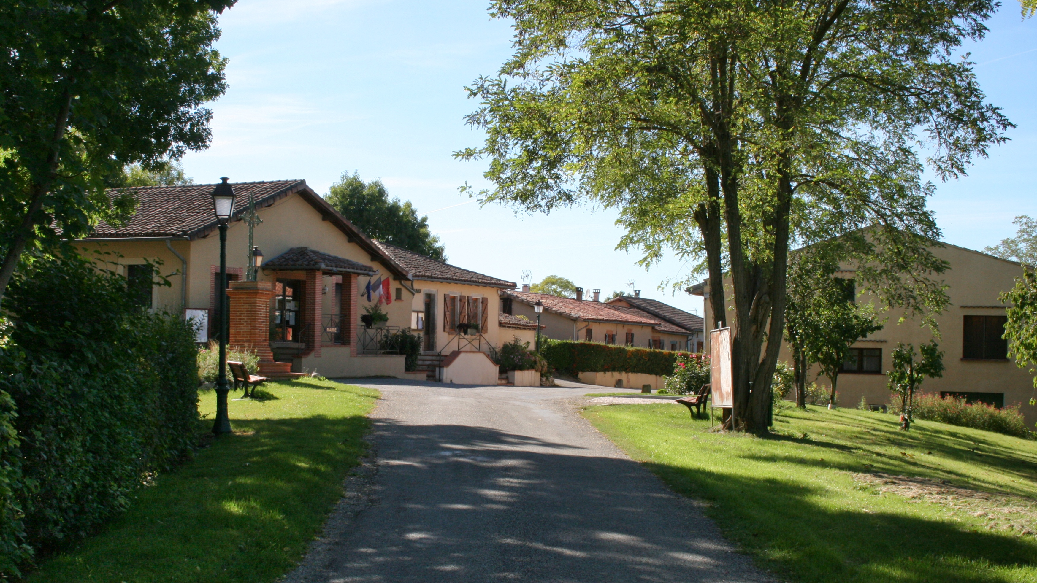 Rue de la commune de Savignac-Mona, dans le Gers